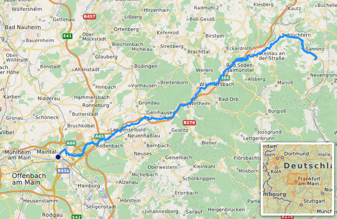 carte réalisée sur umap [1] This map may be incomplete, and may contain errors. Don't rely solely on it for navigation.